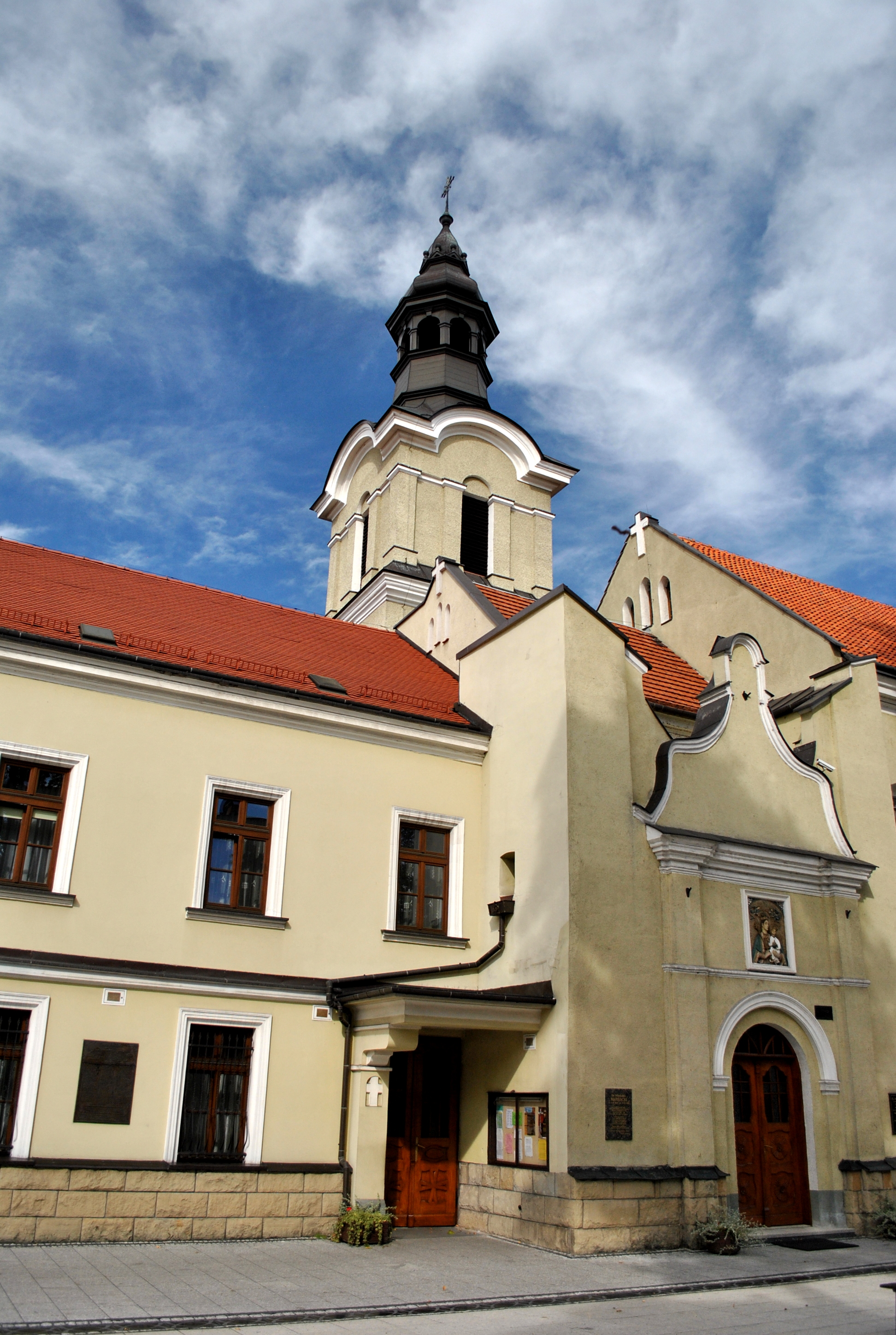 Nowy Sącz, zespół klasztorny norbertanów, ob. jezuitów, XV, XVII